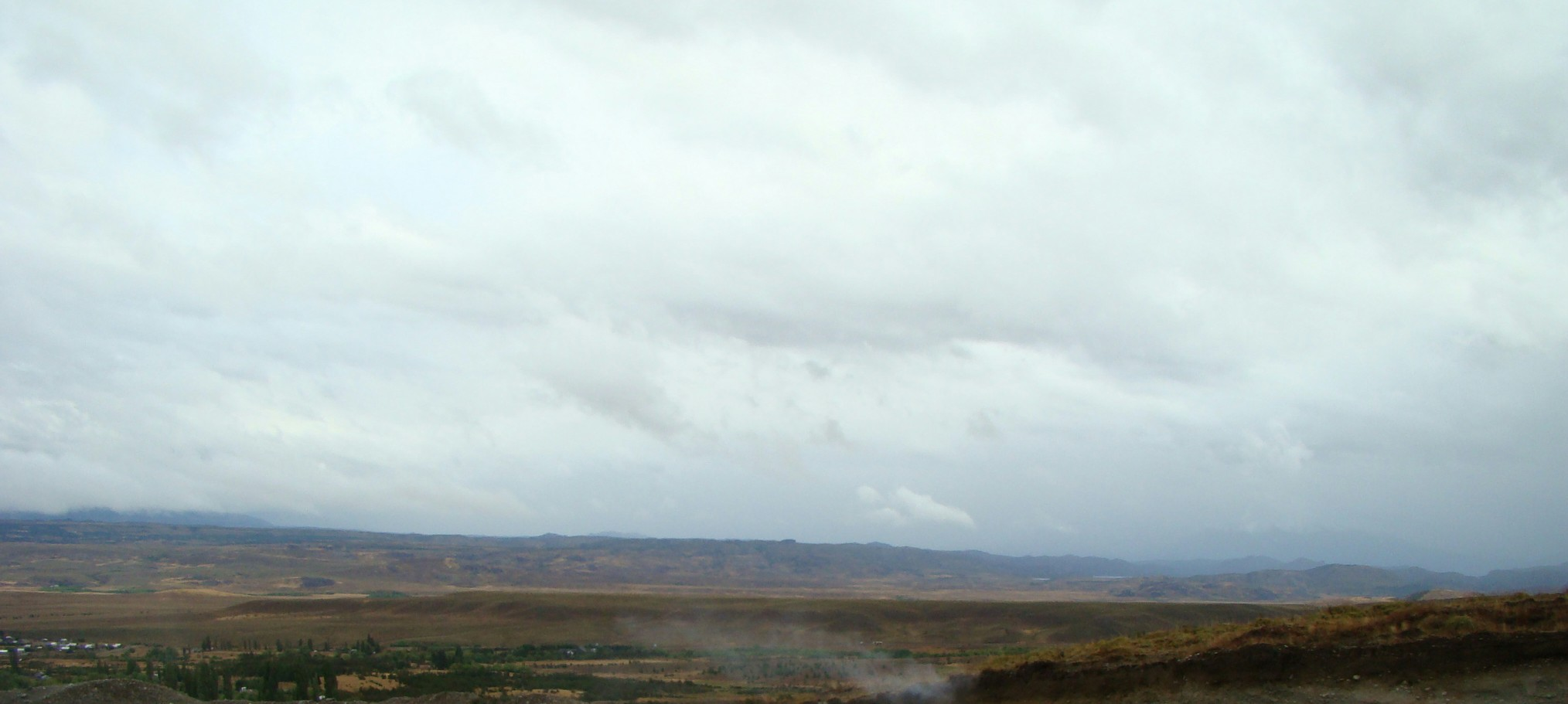 Panoramica Rio Pico, Chubut